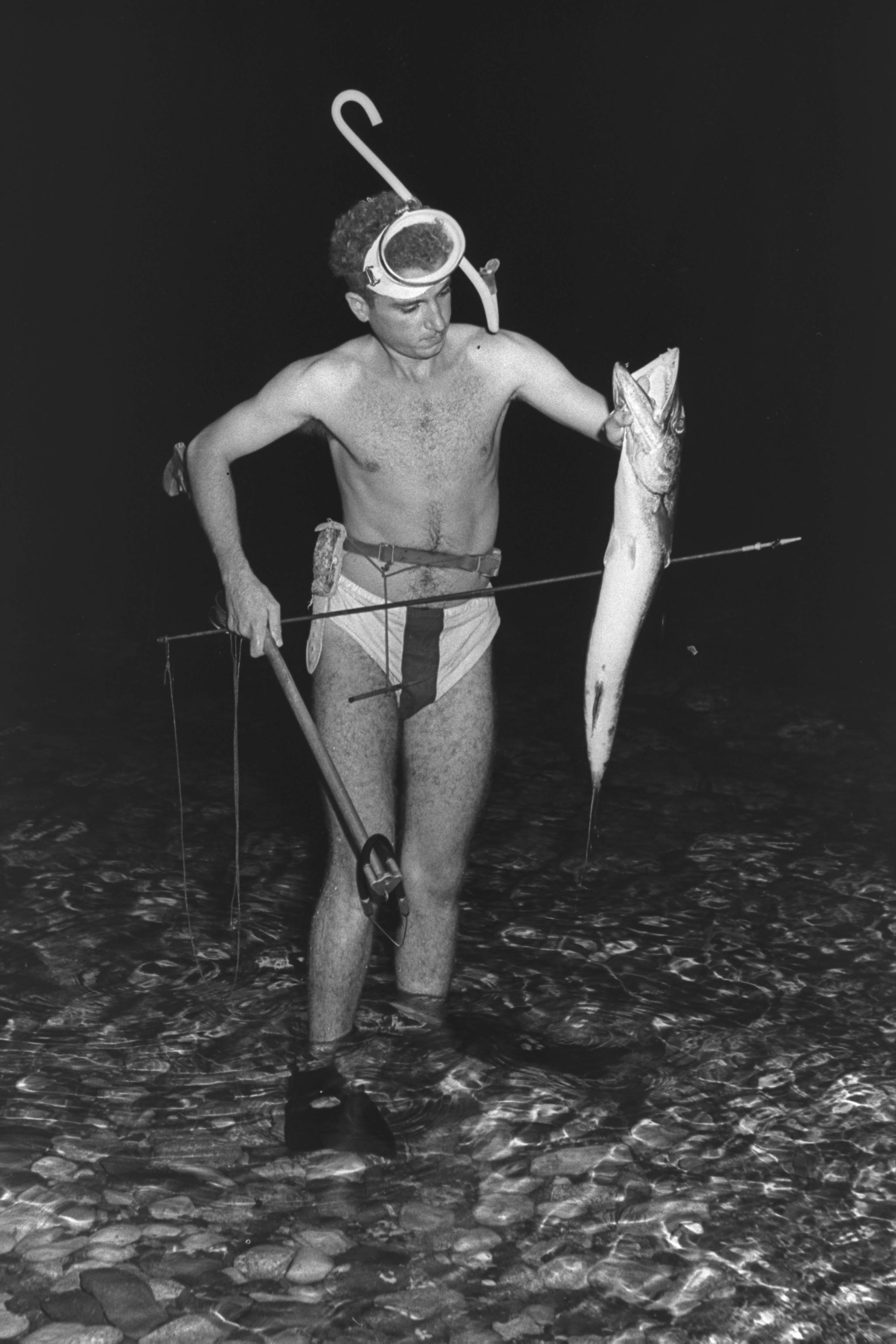 An Eilat skin diver holds his catch, a 13-lb. barracuda fish. צוללן באילת עם שללו, ברקודה במשקל 6 קילו Photo: BRUNER ILAN, 10/01/1955